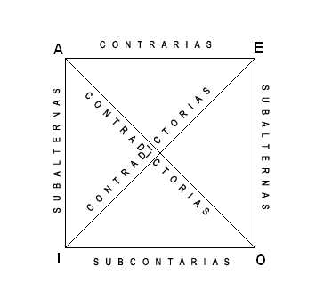 Cuadro de oposición de los juicios aristotélicos own work 20/04/2007 MONIMINO